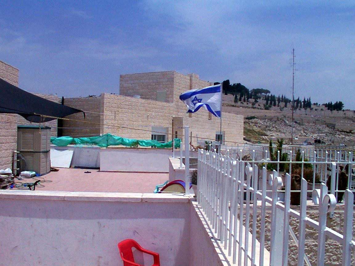 Maale Zeitim neighborhood, east Jerusalem